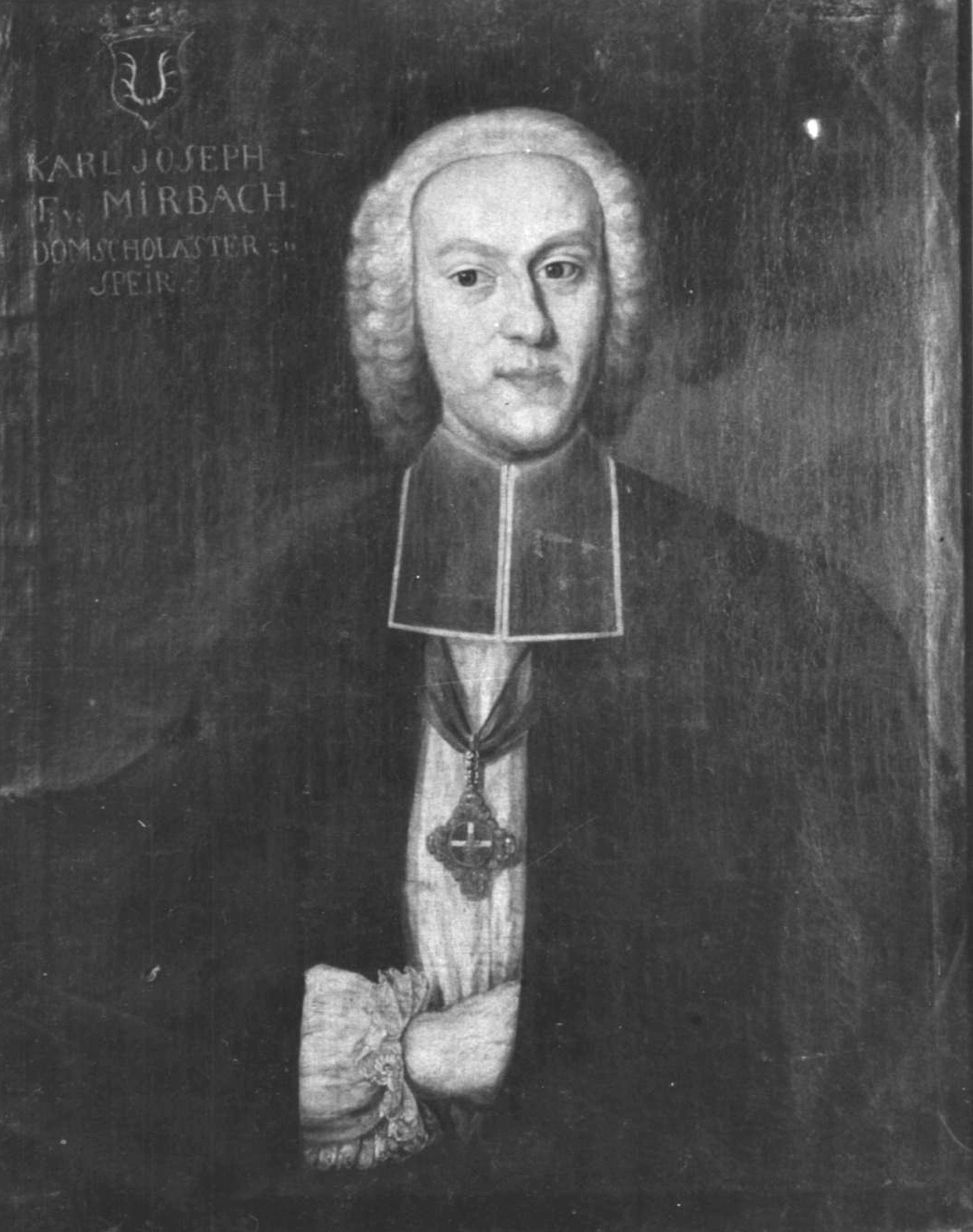 Karl Joseph Freiherr von Mirbach (1718-1798), Domkapitular und Domscholaster in Speyer